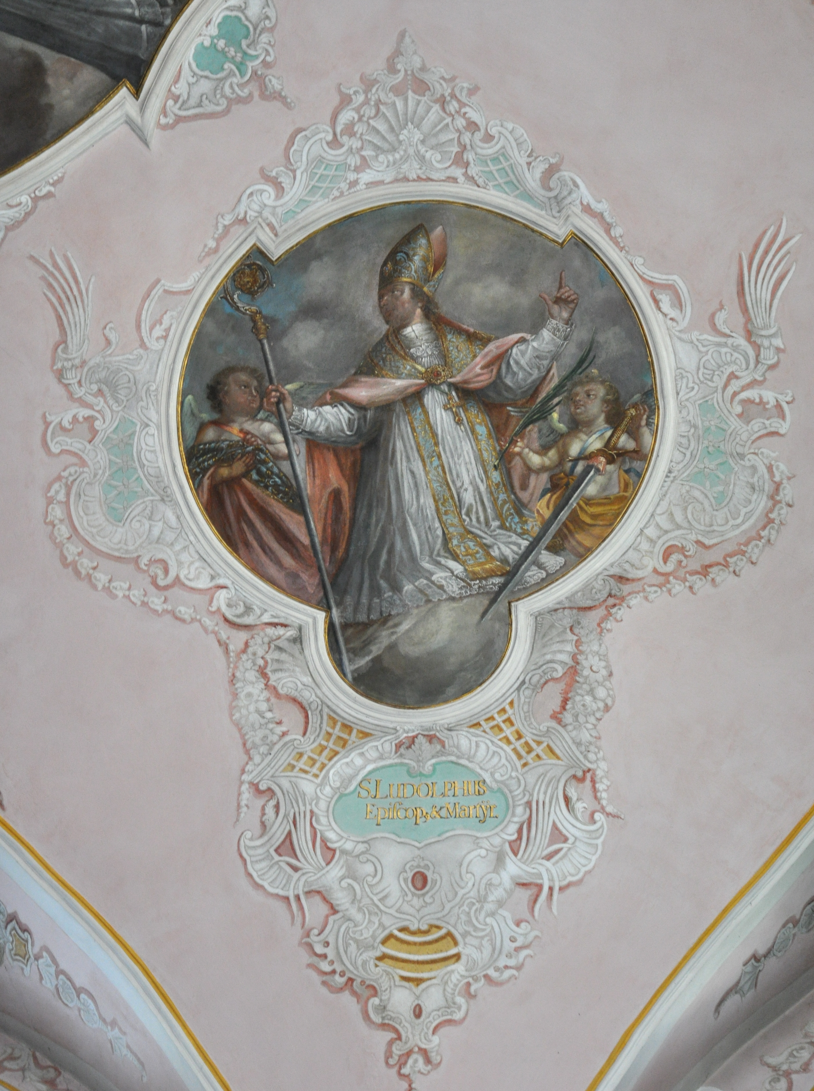 Bad Schussenried, Pfarrkirche St. Magnus (ehemalige Klosterkirche)Fresken im Chor von Gabriel Weiß, 1744 Prämonstratenserheilige: Hl. Ludolphus (Ludolf I., Bischof von Ratzeburg, † 1250)